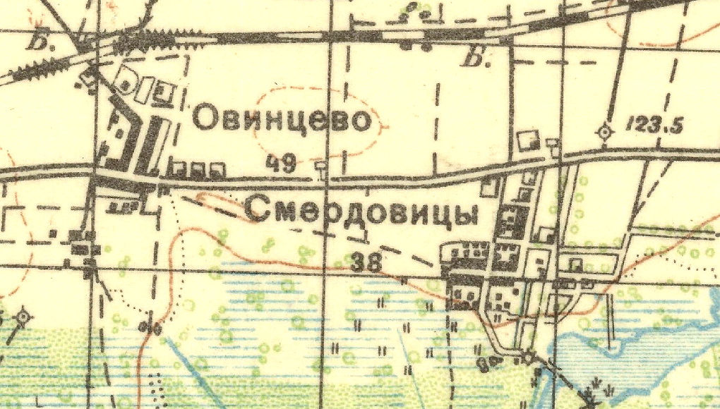 Топографическая карта Ленинградской области, квадрат О-35-23-В (Хотыницы), деревни Овинцево и Смердовицы